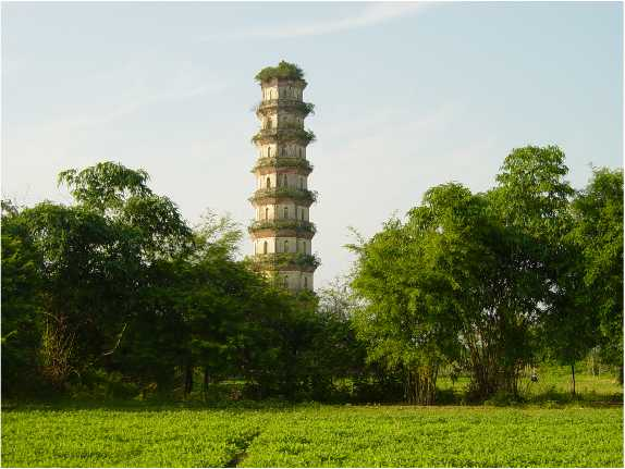 内容介绍：英德文峰塔 原创者：zhuwq 创作日期：2004年4月 创作方法：本人用数码相机拍的。